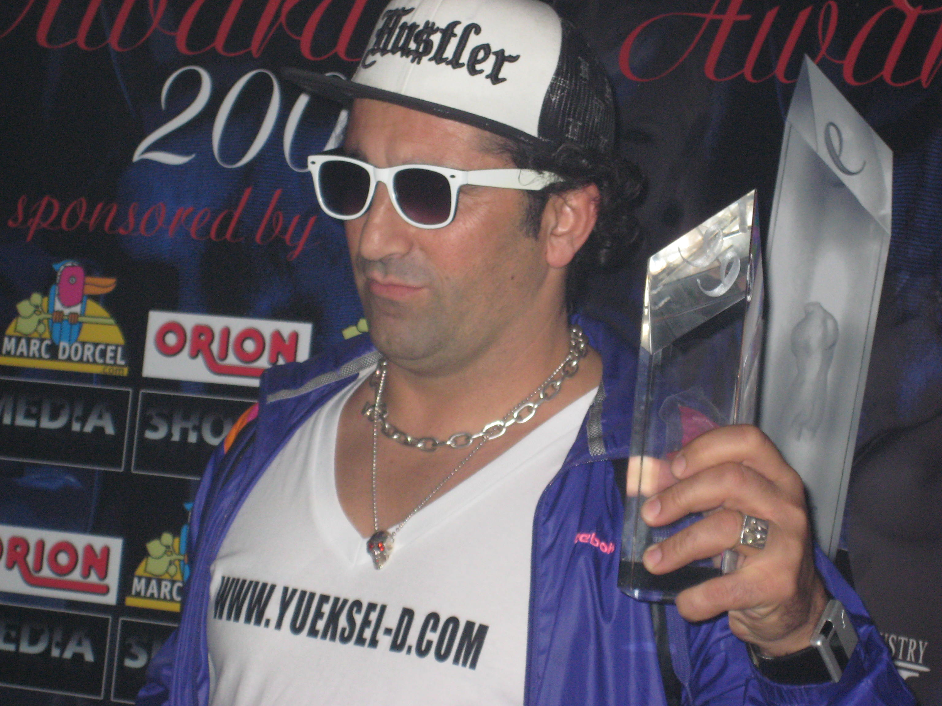 Yüksel D. bei Preisverleihung des Eroticline Awards, 2008